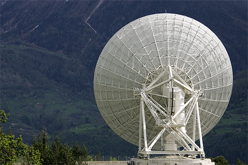 Satellitenschüssel ob Leuk-Stadt